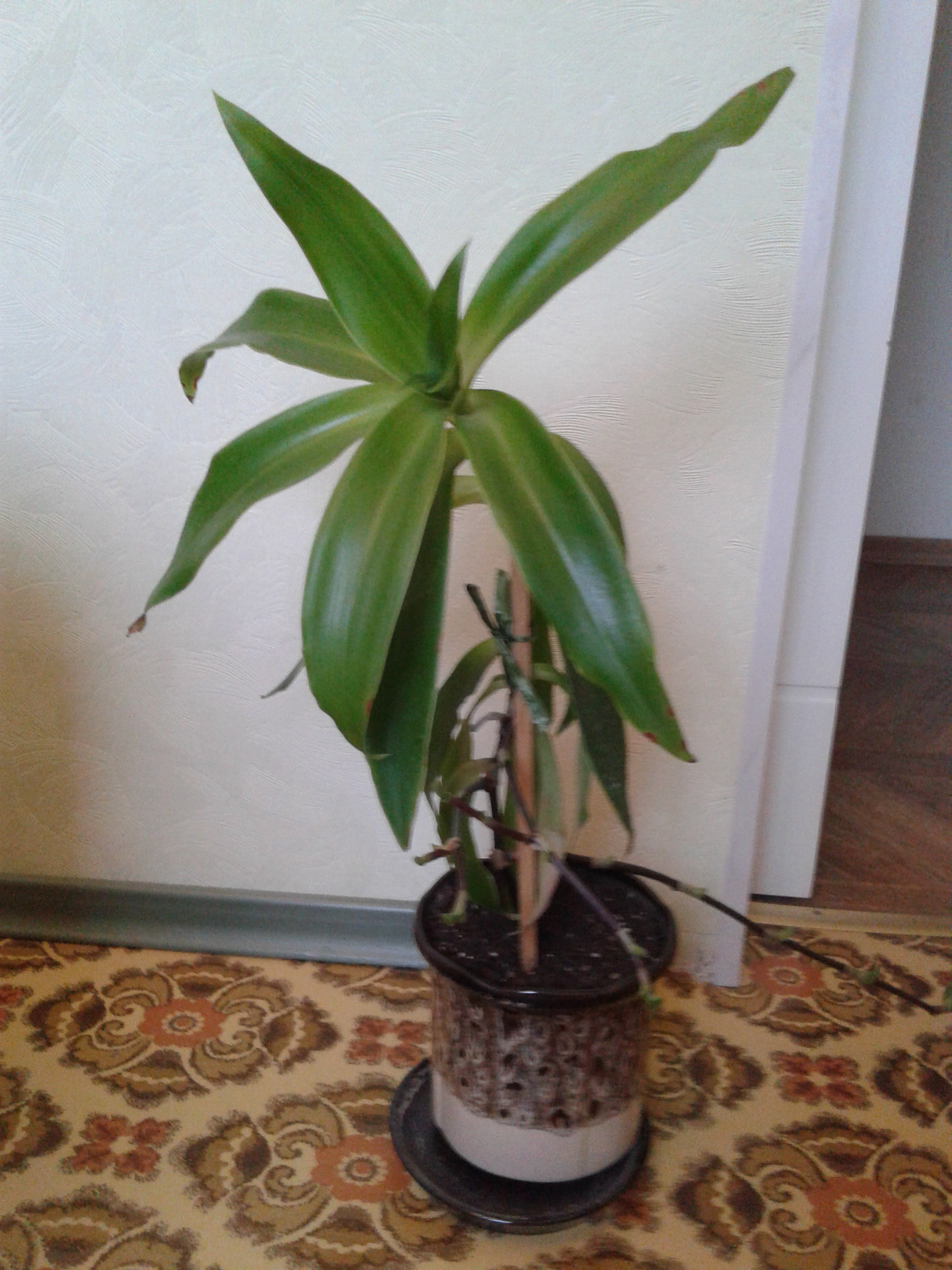 Сабельник (домашнее растение)